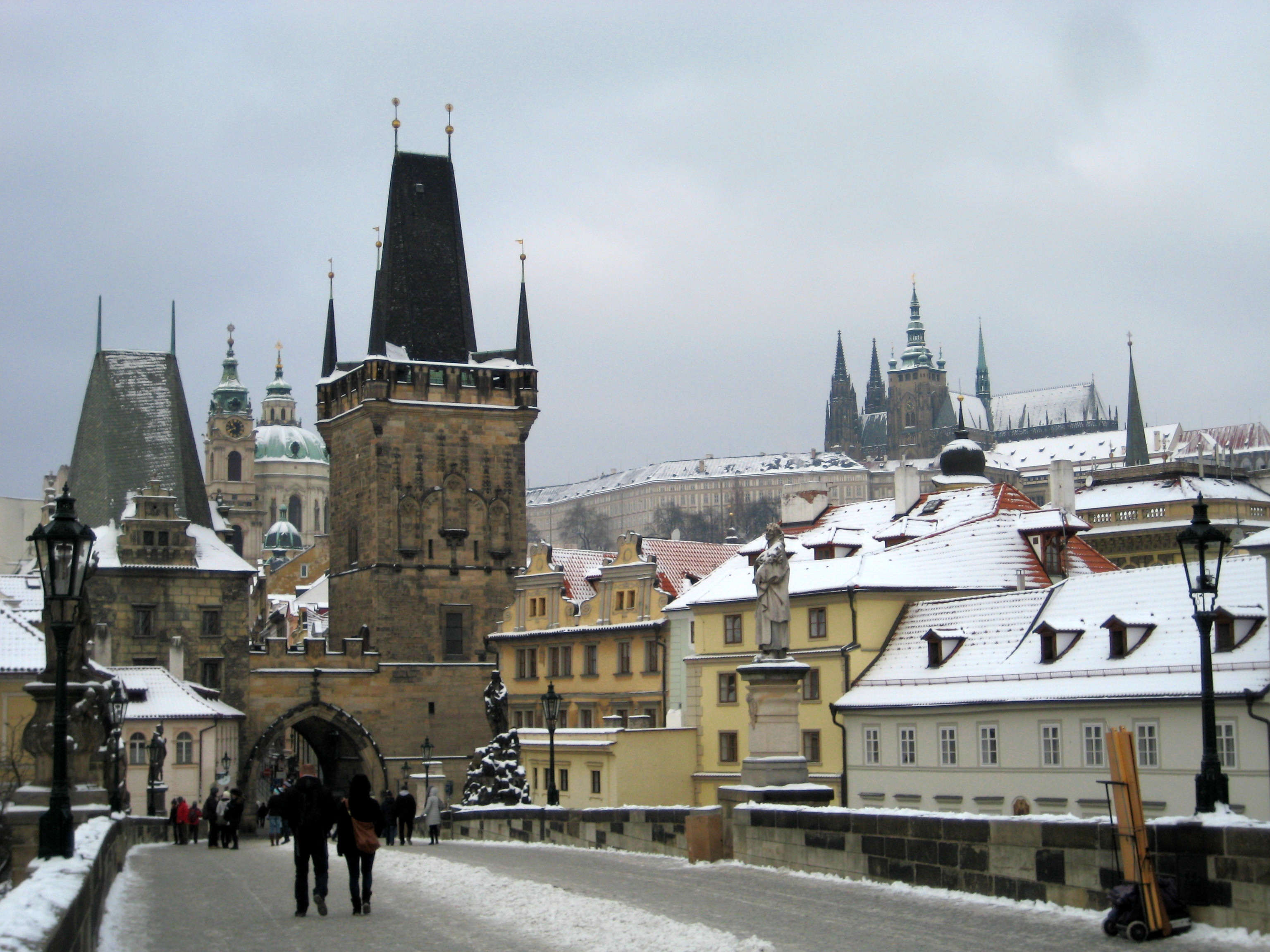 Torre sul ponte Carlo di Praga